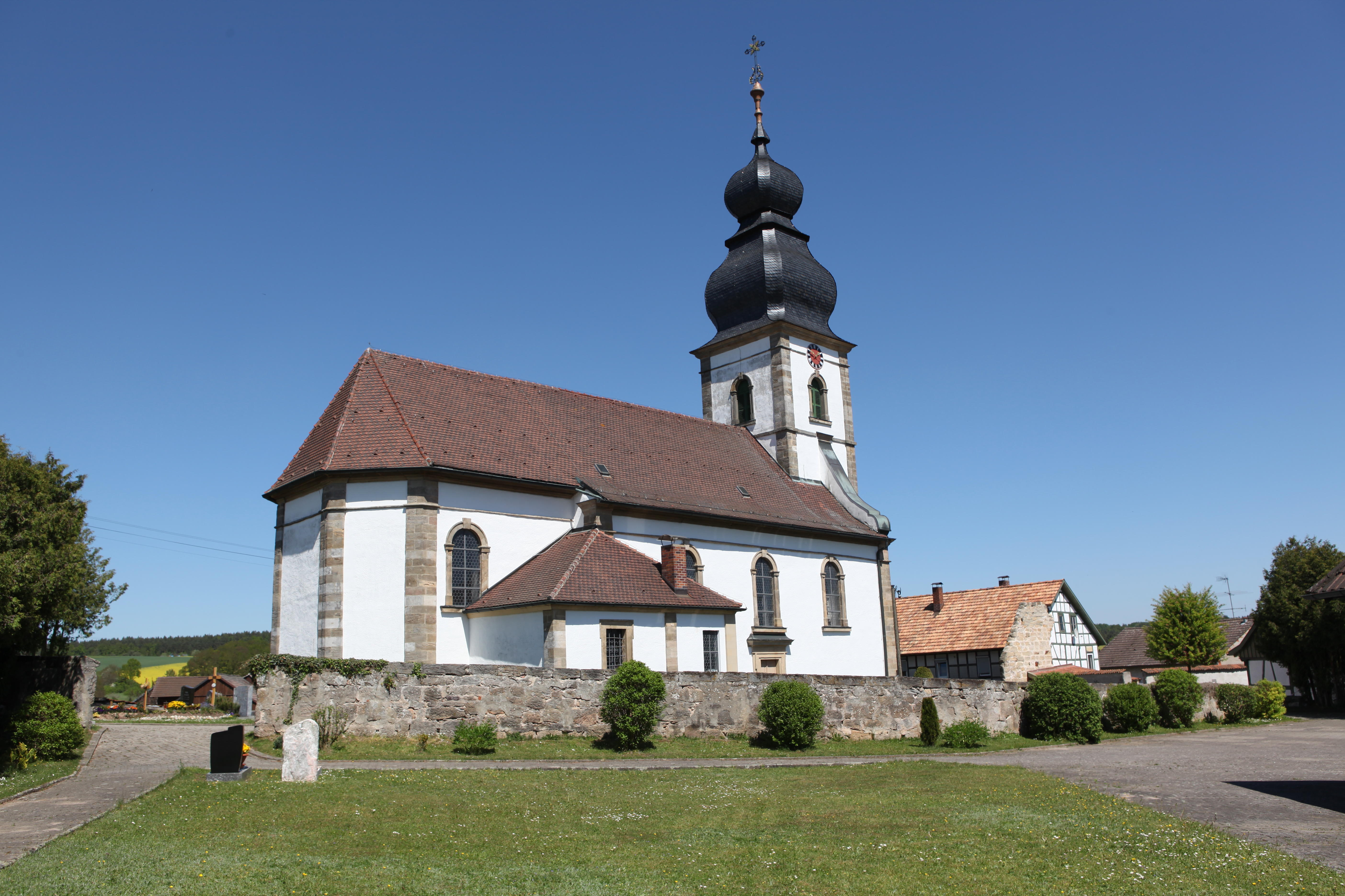 Katholische Pfarrkirche St. Sebastian, Autenhausen, Landkreis Coburg